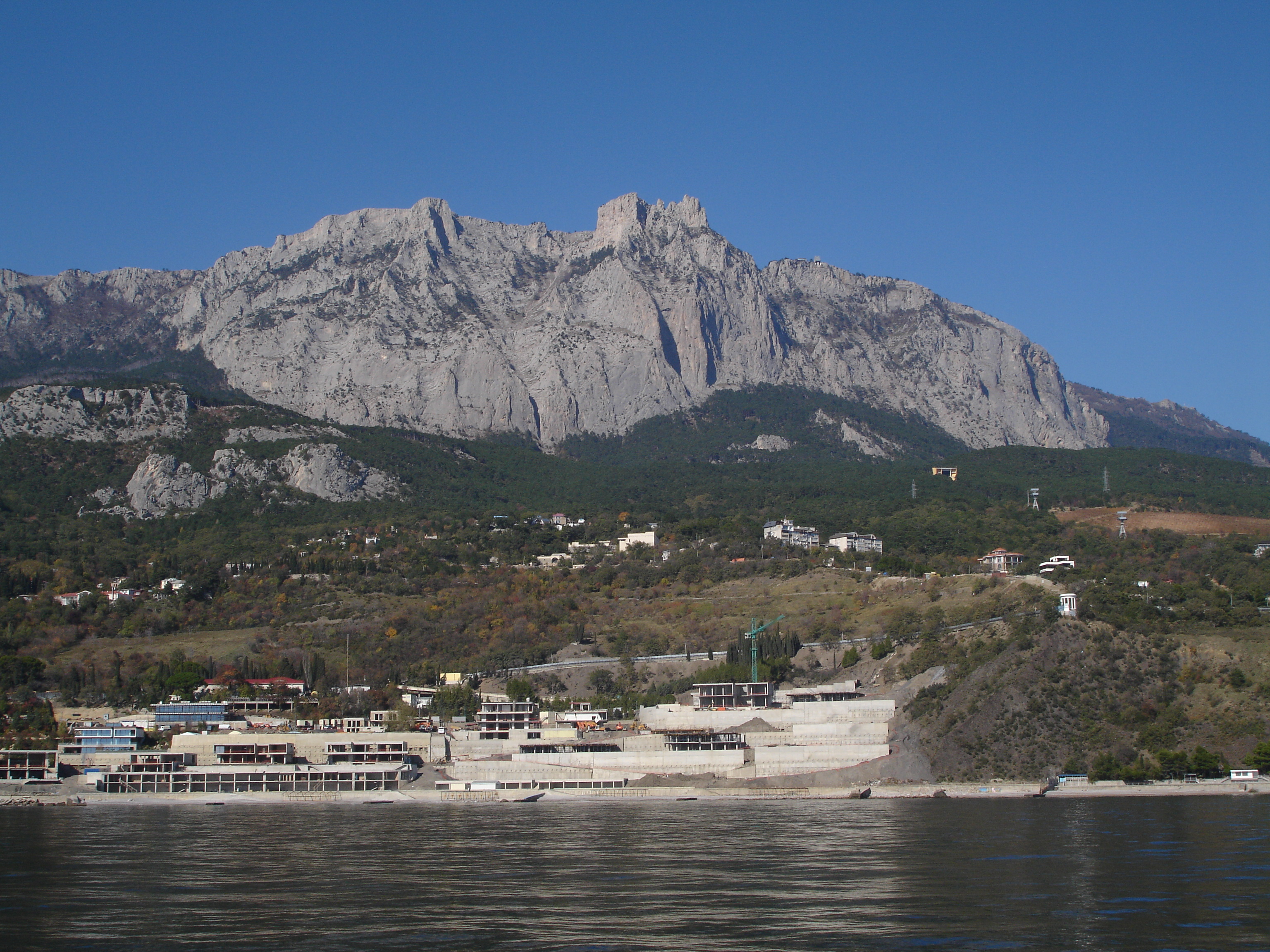 Фото